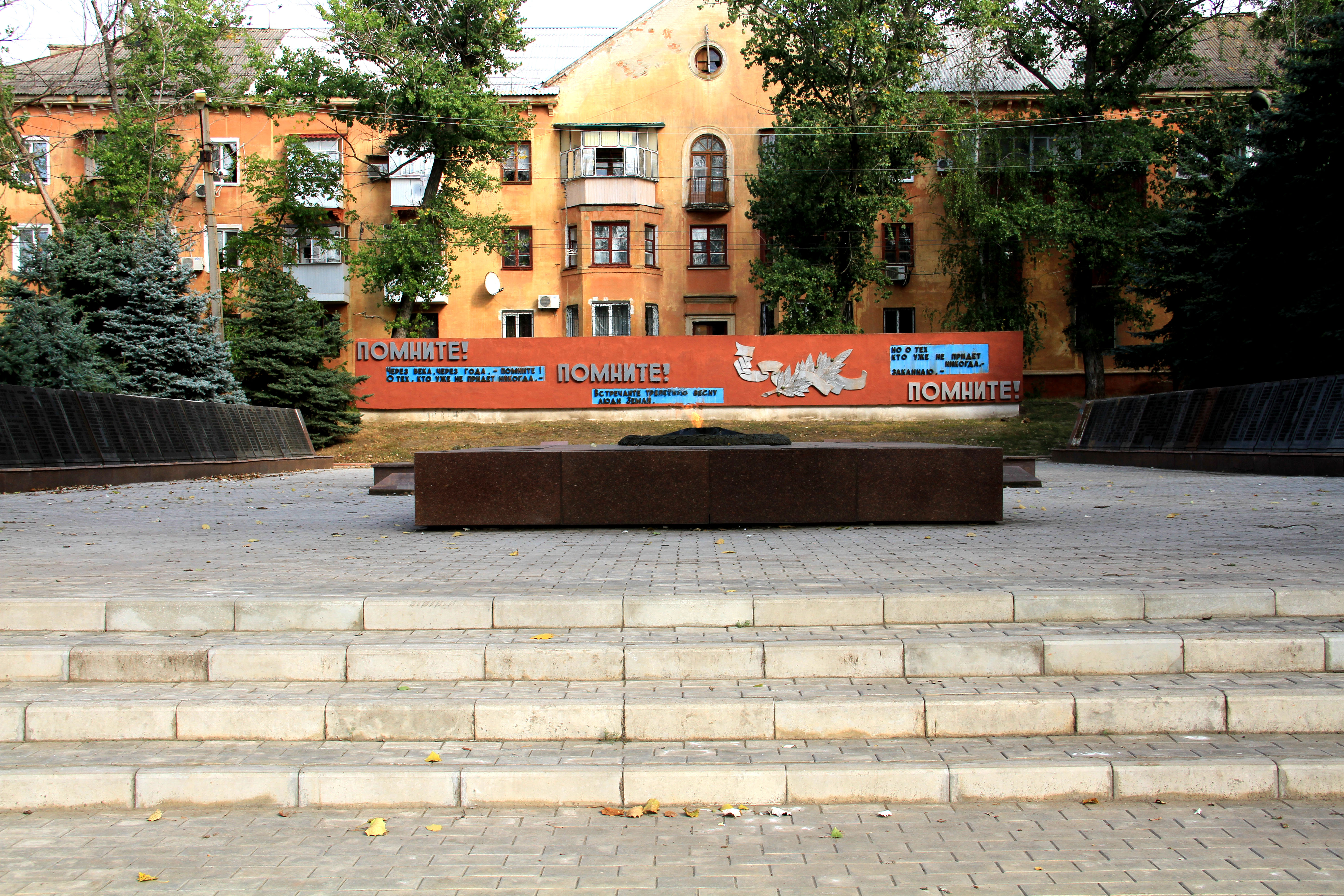 Група могил (3 братські і 1 індивідуальна), де поховані партизани-жертви фашизму та радянські воїни, які загинули в період окупації м. Марганець (серпень 1941 р. — лютий 1944 р.). Поховано 134 люд., Марганець, вул. Радянська, 64-66